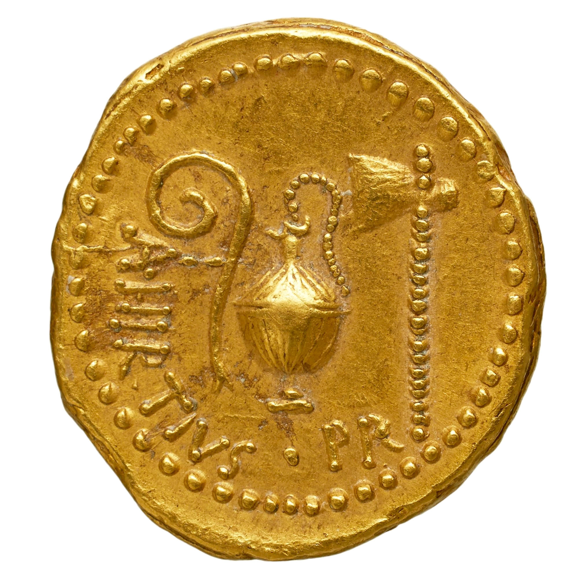 Aureus de Aulus Hirtius au nom de Jules César. Or, 8 gr. Revers :A. HIRTIVS PR (Aulus Hirtius Præfectus), Aulus Hirtius préfet. Instruments pontificaux: lituus, vase à sacrifice et hache. Afrique, 46 av.JC. Collection BnF : REP-21394 - RRC 466/1